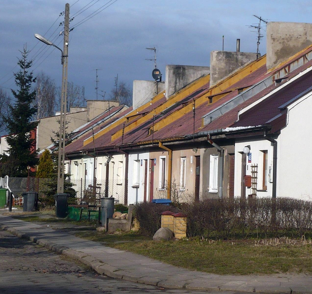 Osiedle 'górnych bloków' w Łodzi na stokowskim wzgórzu. Zbudowane przez Towarzystwo Osiedli Robotniczych w 1936 r.